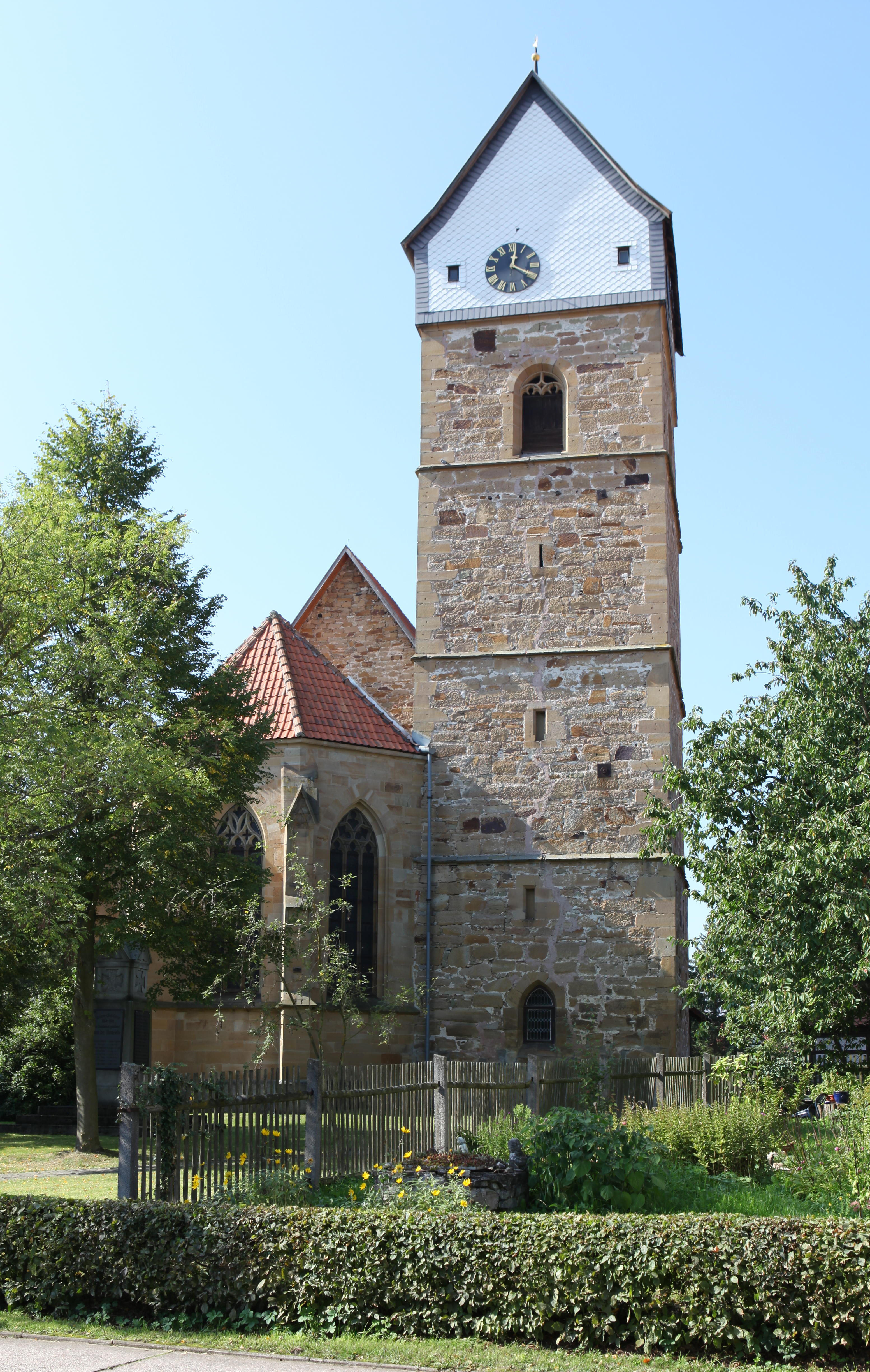 Evangelische Magdalenenkirche in Milz, Landkreis Hildburghausen